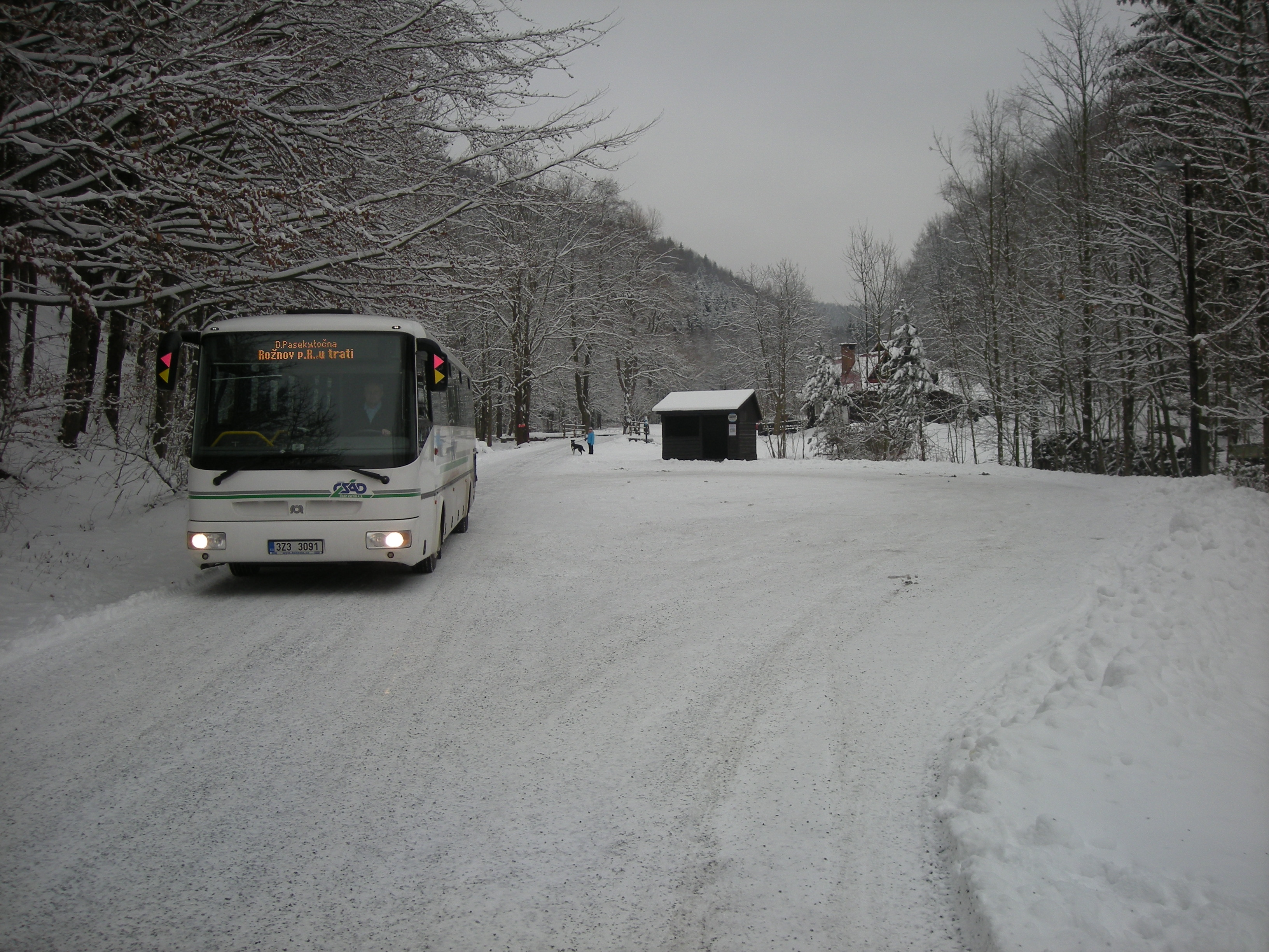 ČSAD Vsetín na zastávce Rožnov pod Radhoštěm - Dolní Paseky, točna